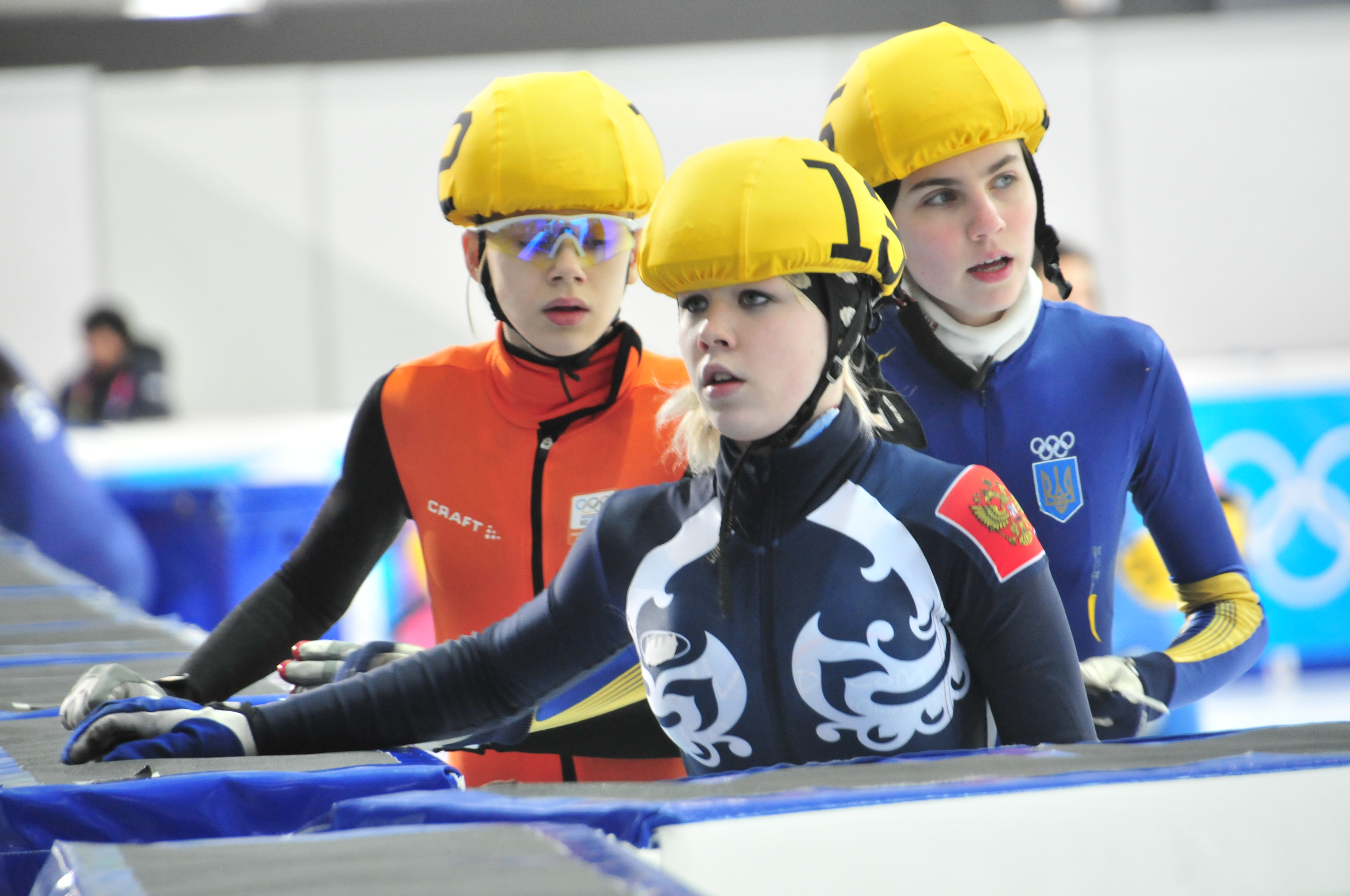 1. Jugendolympiade 2012 Innsbruck. Aafke Soet (Niederlande), Anna Gamorina (Rußland) und Mariya Dolgopolova (Ukraine) von links nach rechts. Teilnehmerinnen am Short Track Speed Skating Erste Olympische Jugend- Winterspiele 201213. bis 22. Jänner in Innsbruck Dieses Foto wurde durch die Unterstützung von Wikimedia Österreich und die Twoonix Software GmbH ermöglicht.